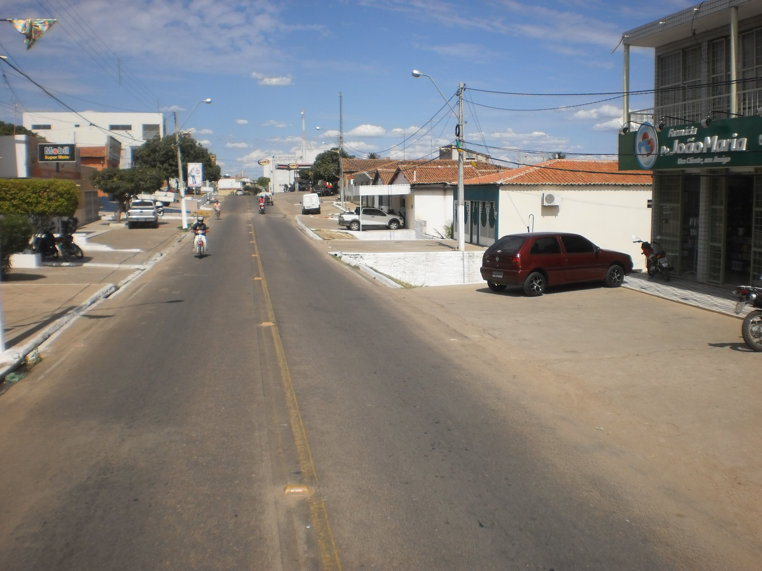 RN-288 na Avenida Rio Branco. Jardim de Piranhas, Rio Grande do Norte, Brasil.